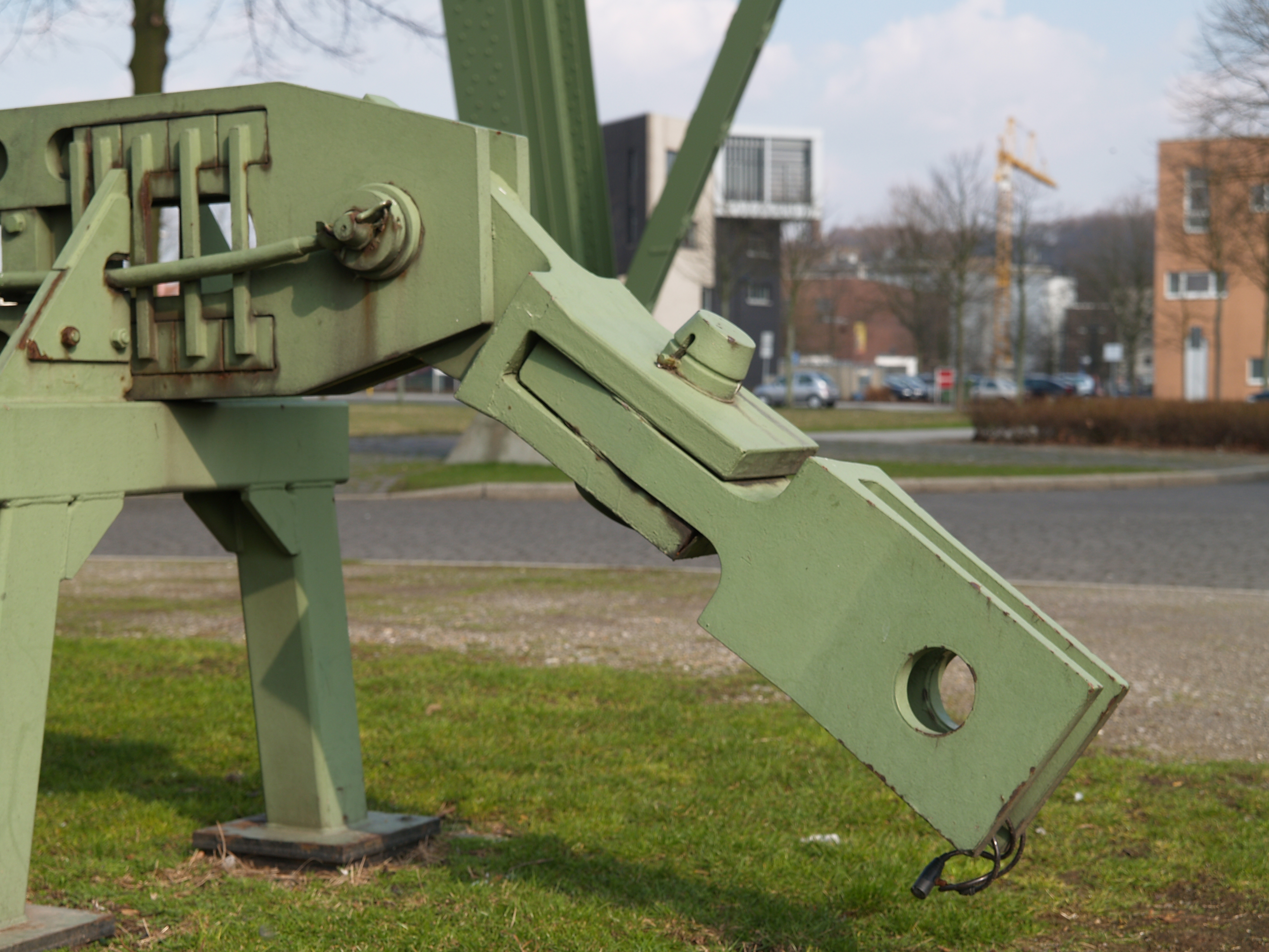 Aufgebocktes Zwischengeschirr, das Element zur Verbindung eines Förderkorbes mit dem Förderseil, Detail Verbindung zum Förderkorb, vor dem Förderschacht der ehemaligen Zeche Erin in Castrop Rauxel. Im Betrieb ist die linke Seite oben.